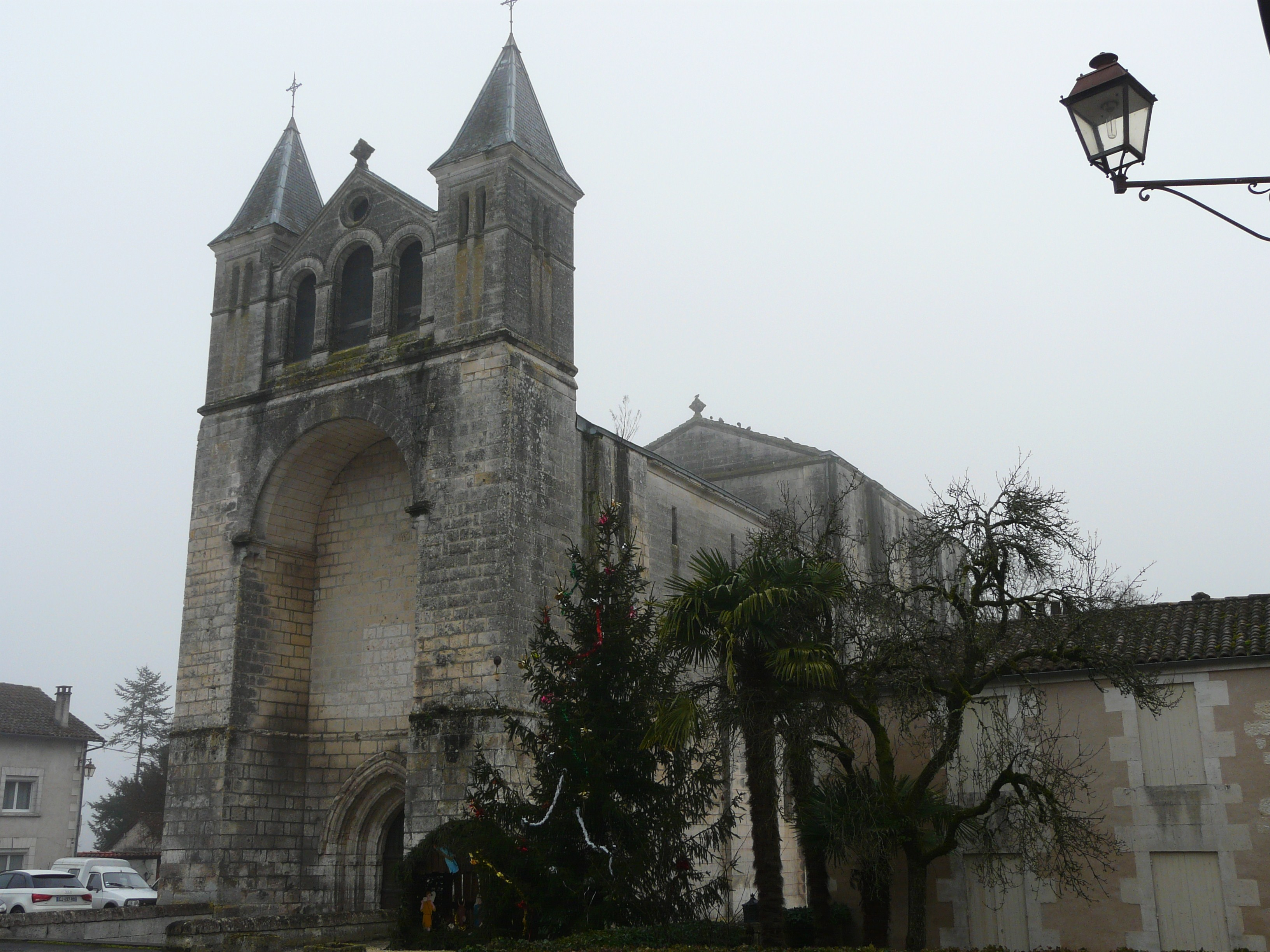 L'église de Celles, Dordogne, France.